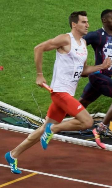 d9_16 finale 4x400m team belgium